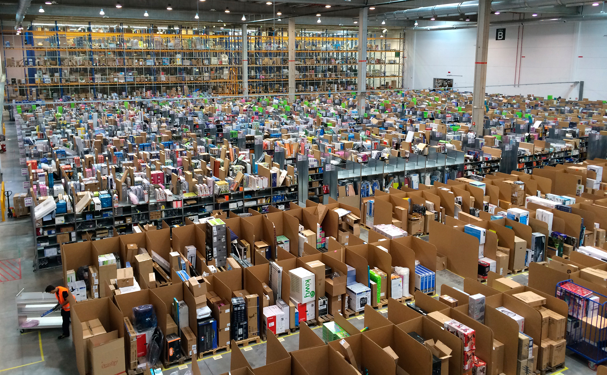 Una visita al gigantesco Centro Logístico de Amazon España en San Fernando de Henares (Madrid)